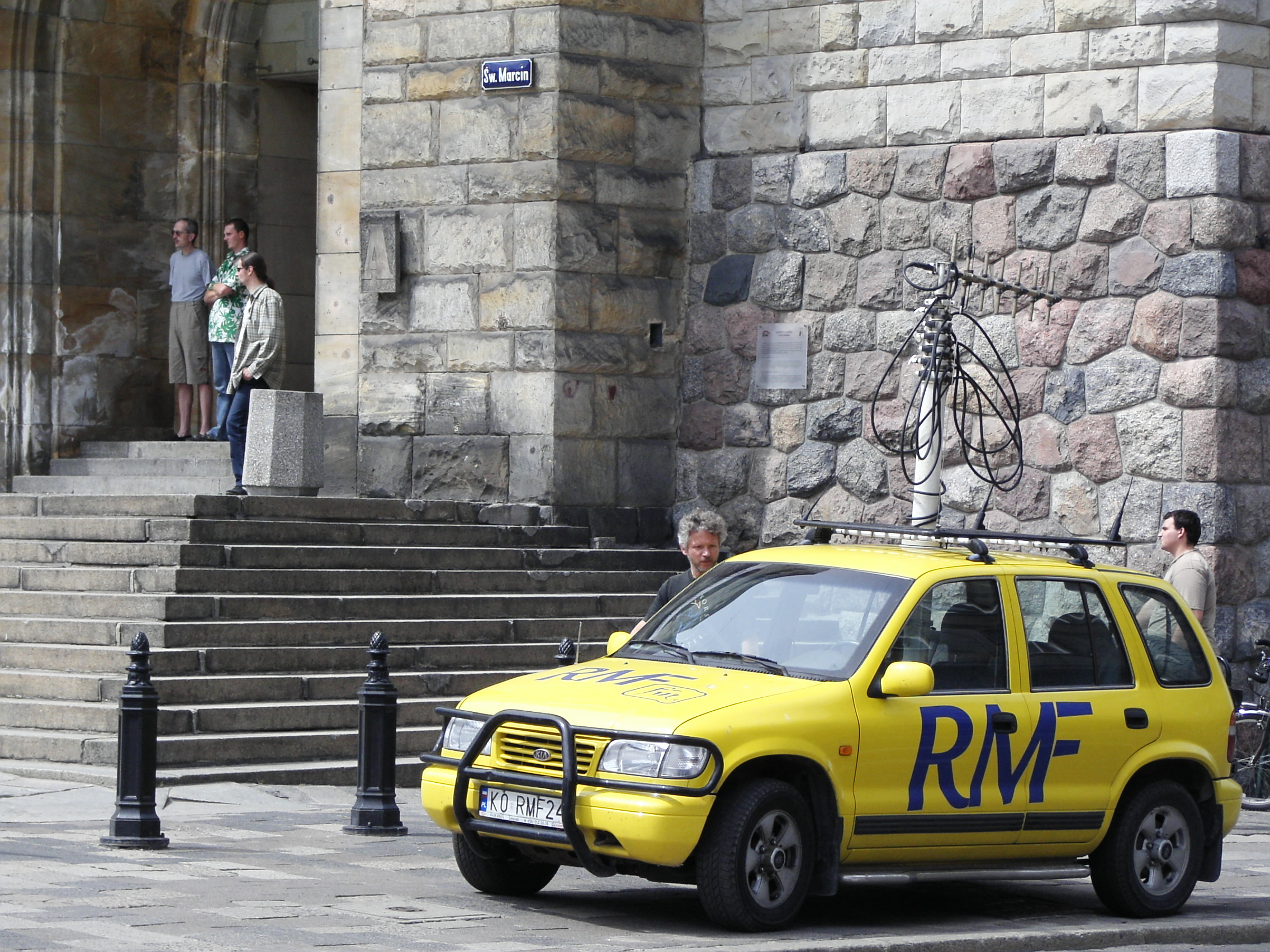 RMF FM woz reporterski w Poznaniu. Kia Sportage.